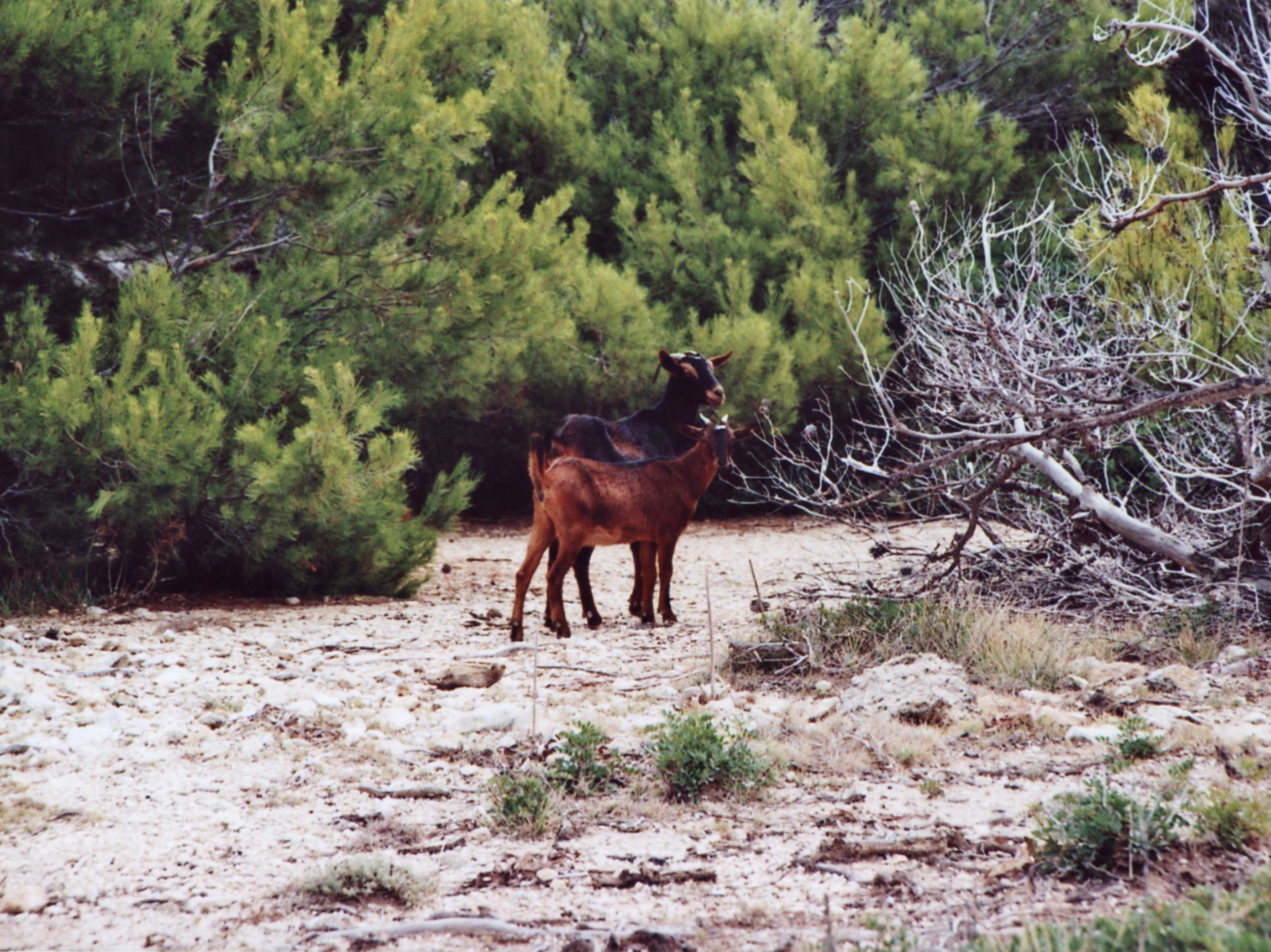 Wildziegen bei Cala es Matzoc, Gemeindegebiet Arta